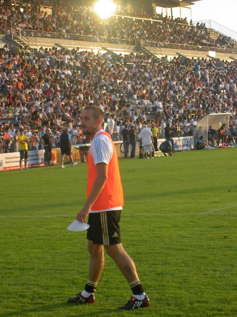 Gaël Givet lors d'un match d'avant saison face à Bordeaux